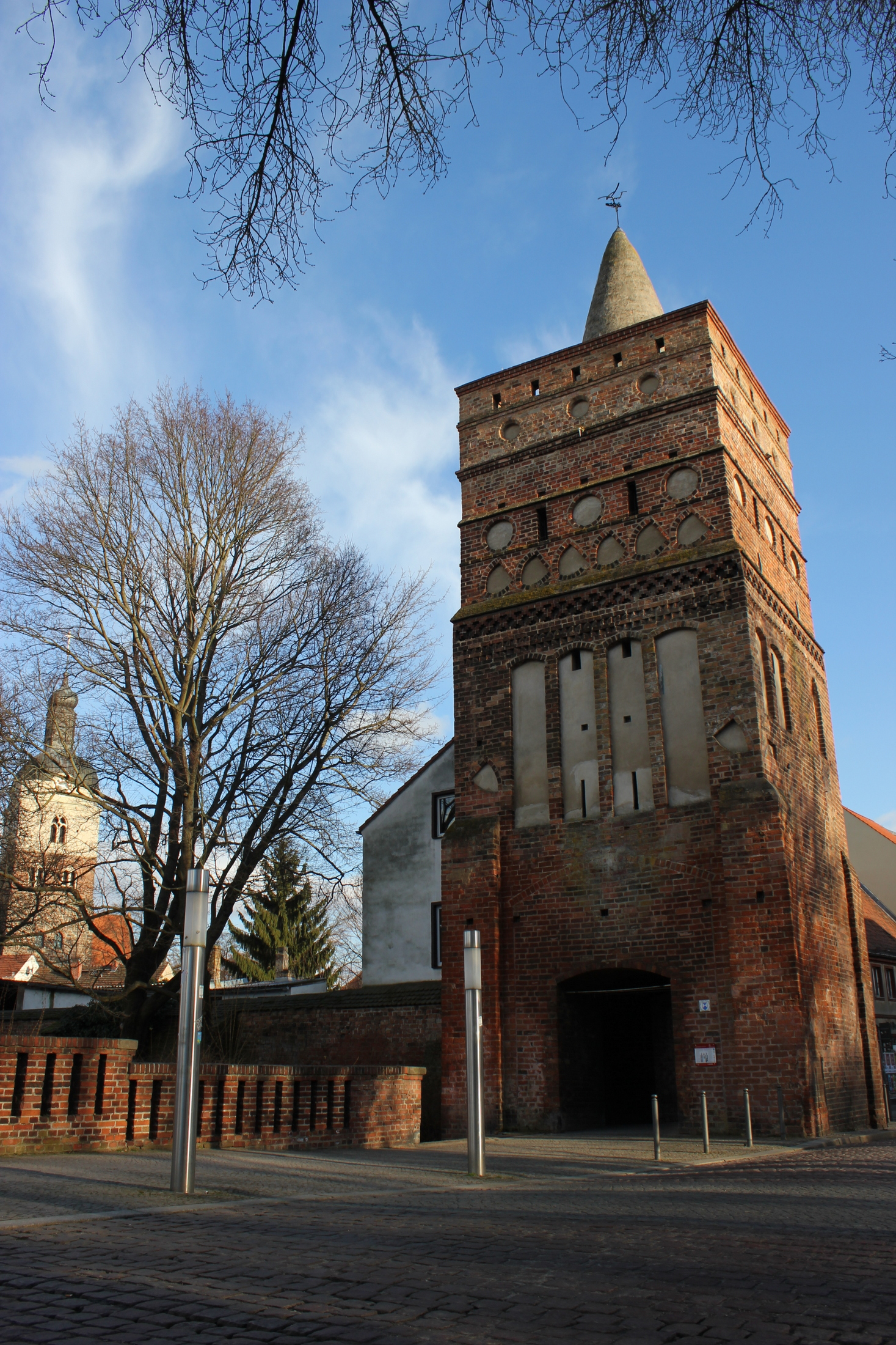 Brandenburg an der Havel, Rathenower Turm.